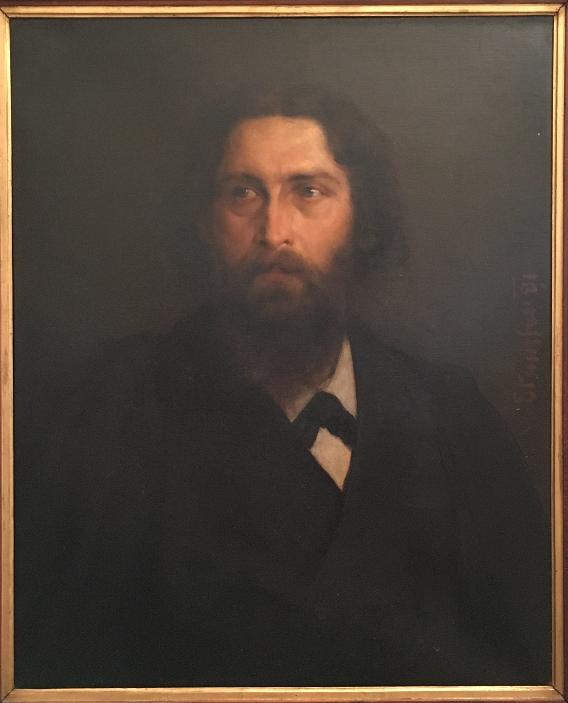 Vermutlich Selbstportrait